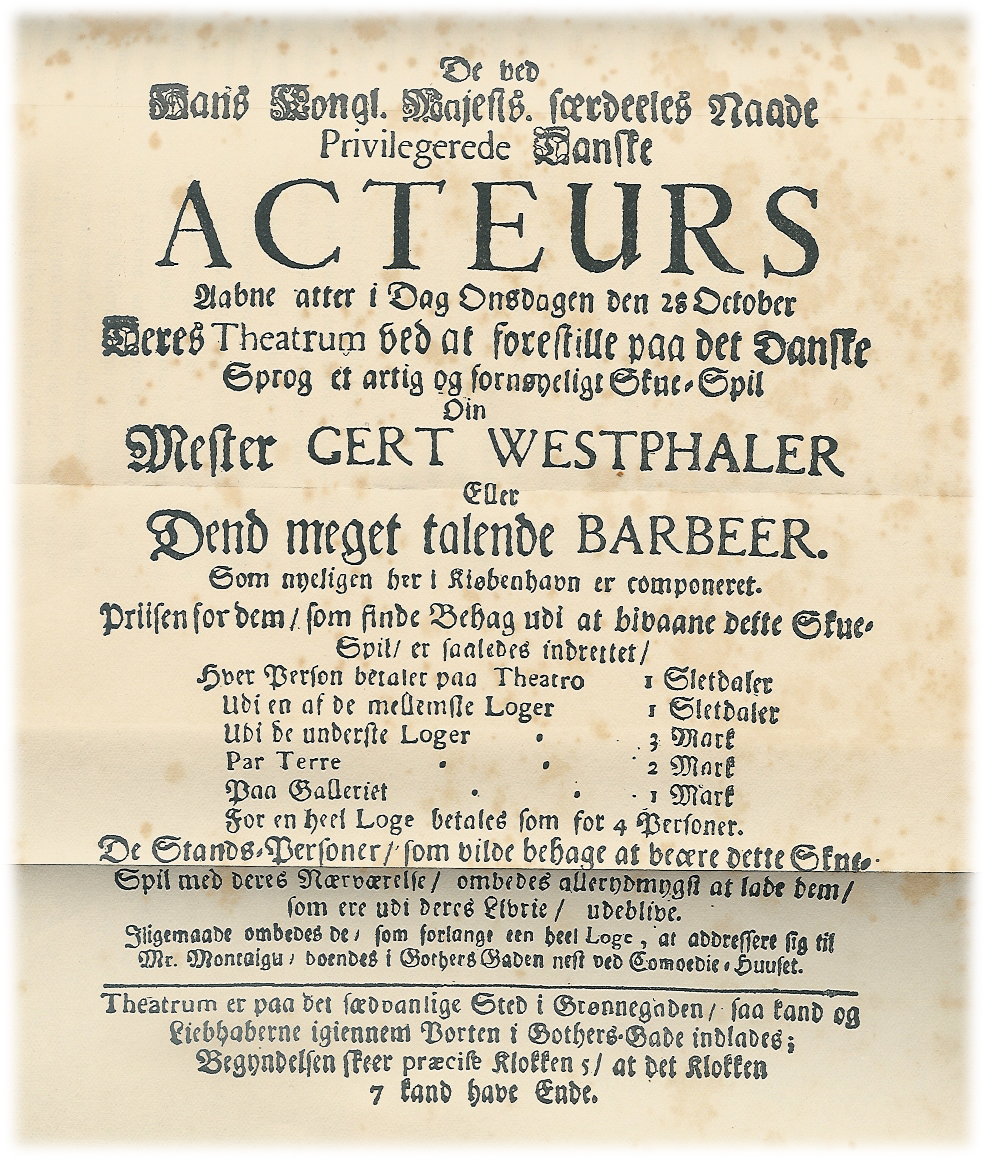 Den ældste bevarede teaterplakat for et af Holbergs stykker. Det opførtes 22. oktober 1722.